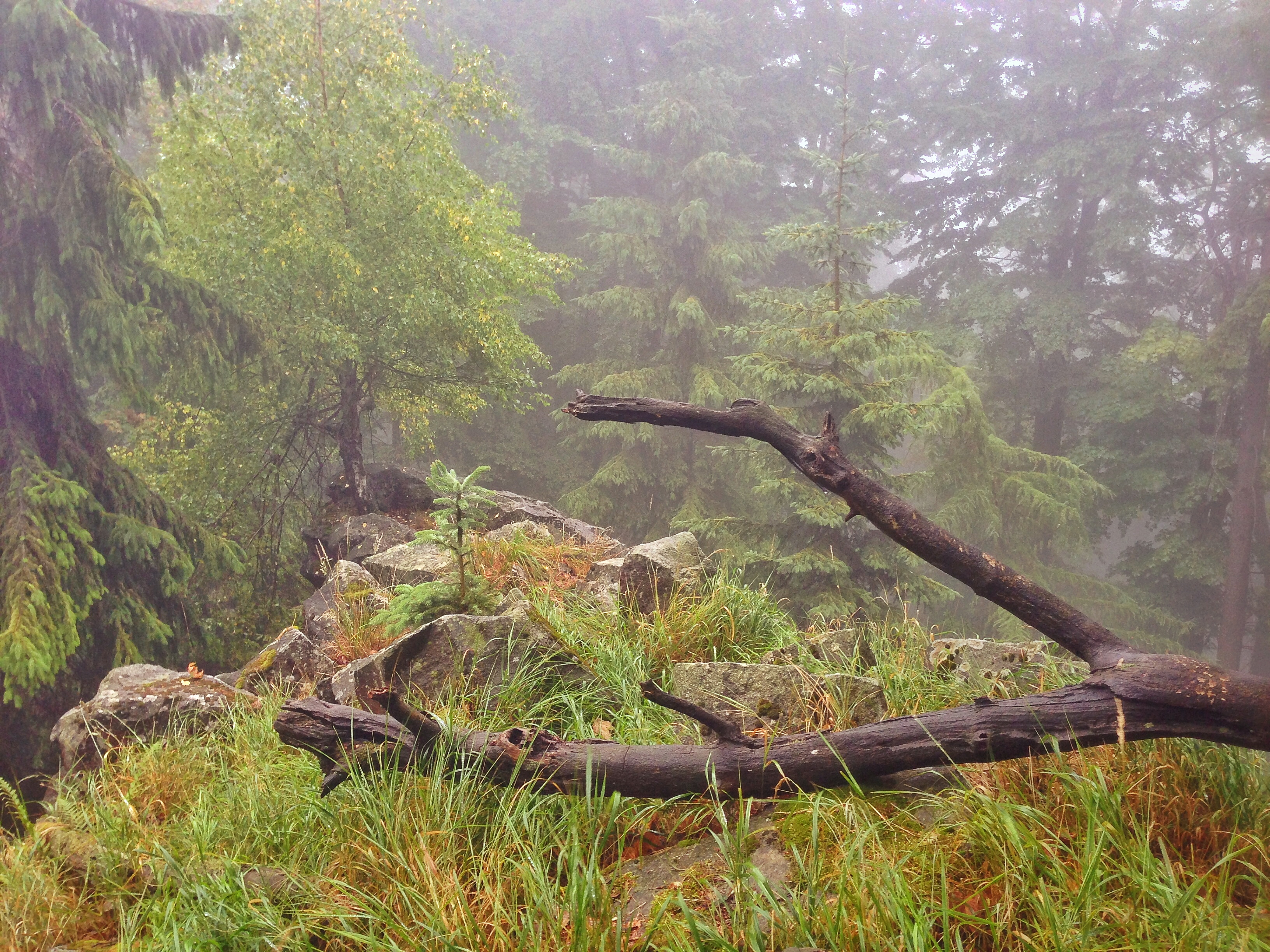 Skalní ostroh na vrcholu Sokola